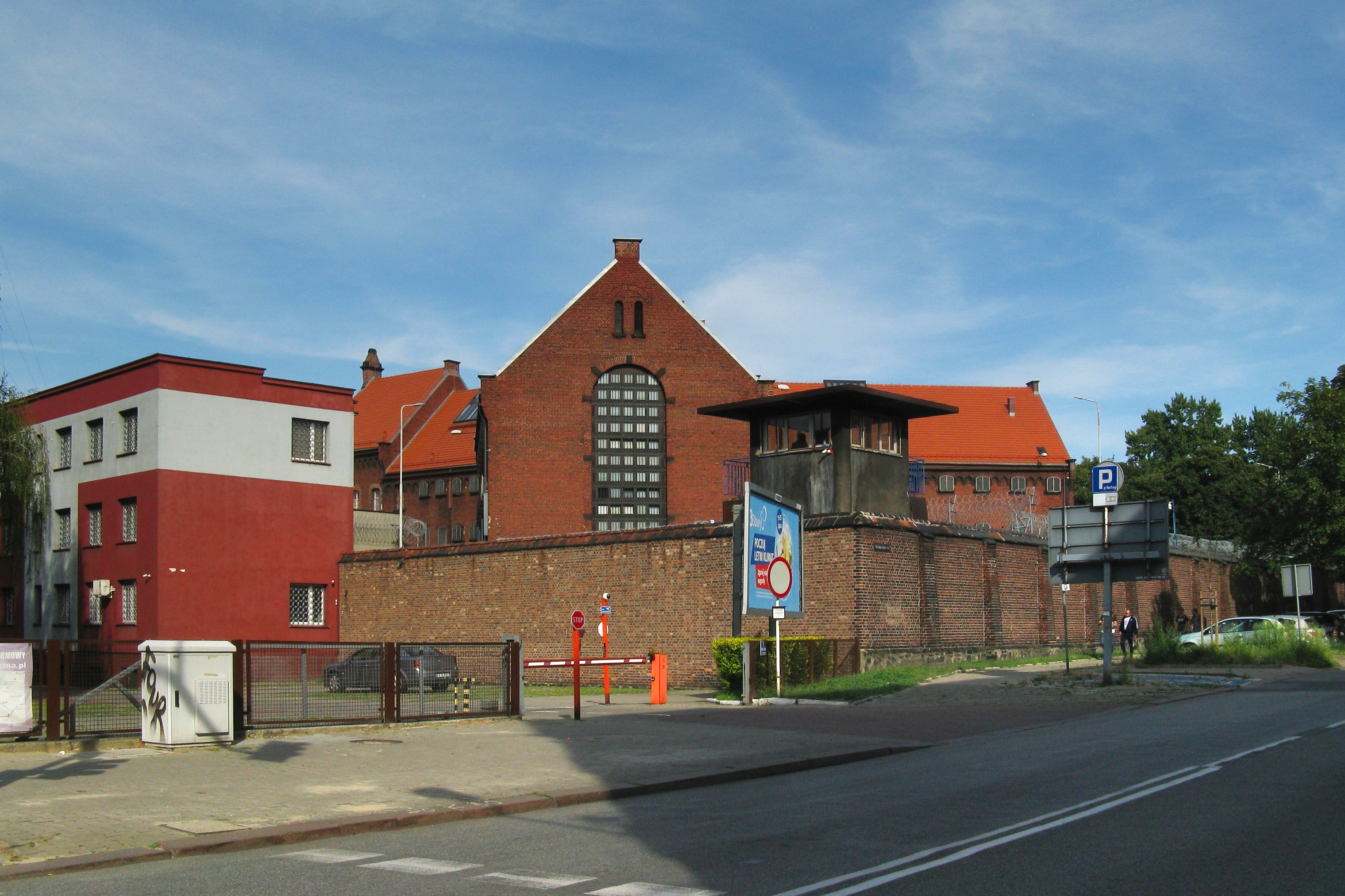 areszt przy ul. Mikołowskiej w Katowicach, widok z zachodu, z prawej ulica Mikołaja Kopernika